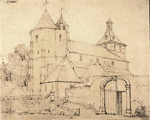 L'ancienne église Saint-Pierre de Lourdes, démolie à la fin du XIXe siècle. Mine de plomb. Anonyme. Musée du Louvre, département des arts graphiques.